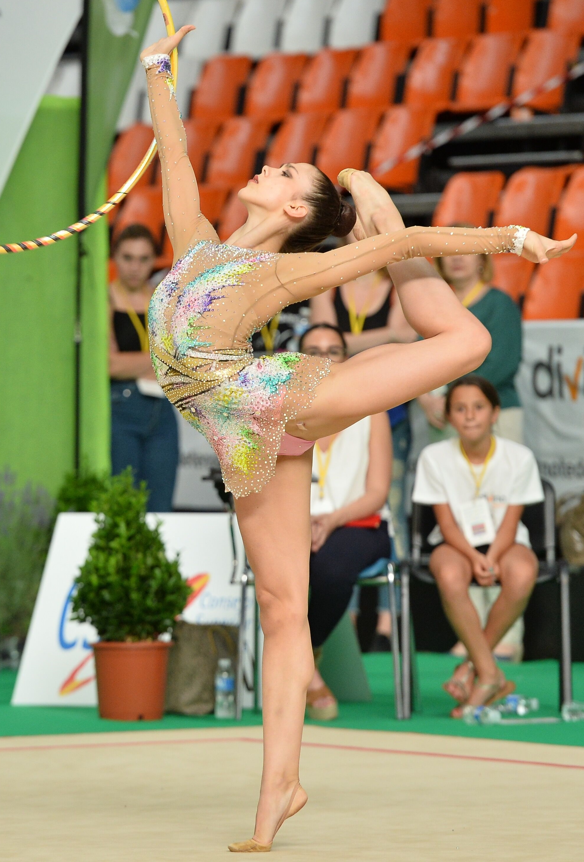 Polina Berezina en el Campeonato de España Individual en Valencia en junio de 2017.